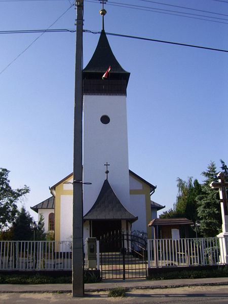 A balkányi Urunk színeváltozása görög katolikus templom